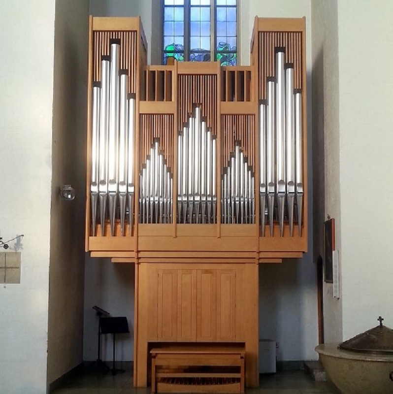 Interior of Maria Königin des Friedens (Munich)